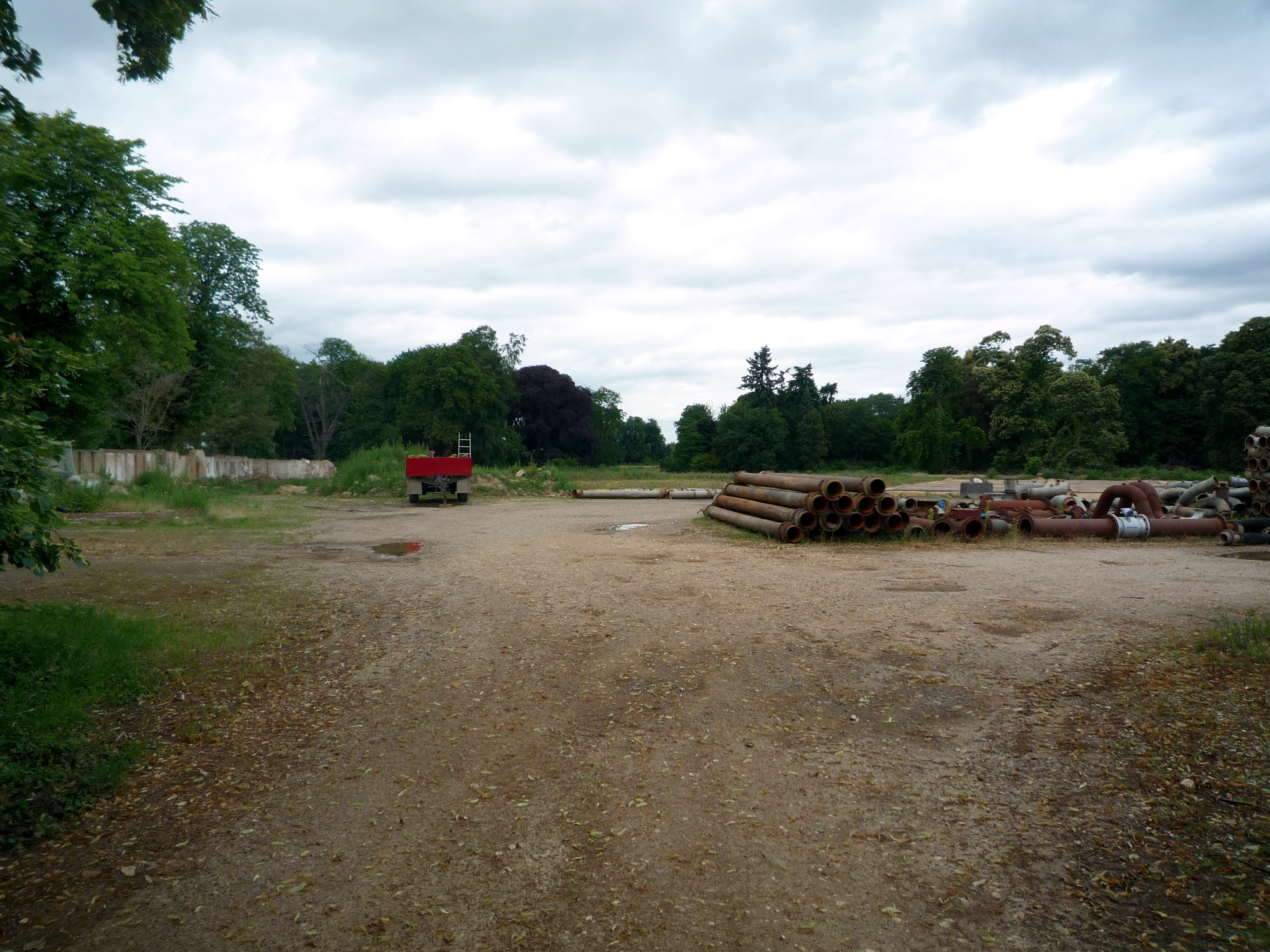 Gelände des Sittarder Hof, fotografiert aus Richtung der früheren Hauptzufahrt